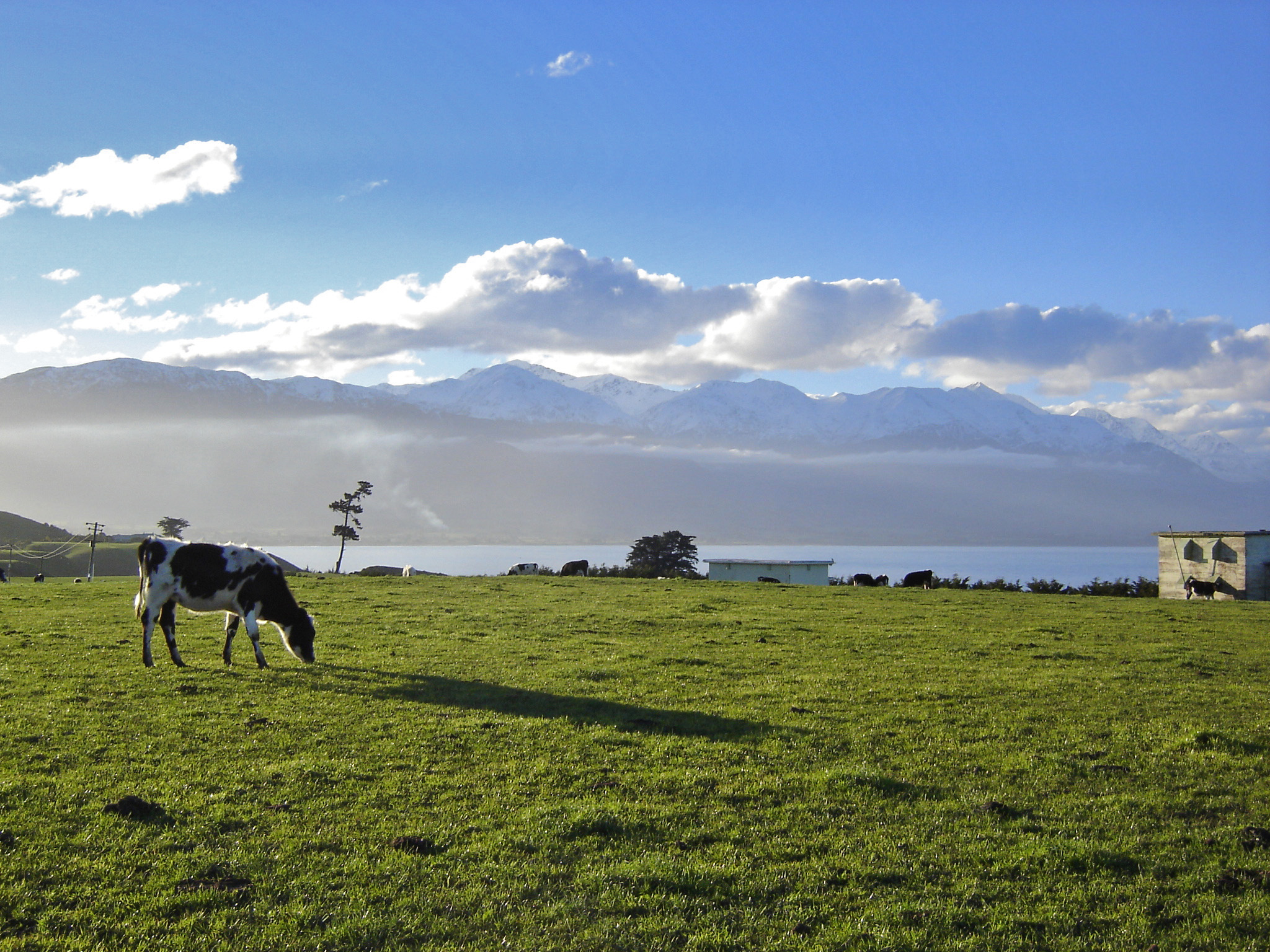 Blick auf die Kaikora Ranges von einer Hochebene bei Kaikoura, Südinsel, Neuseeland.